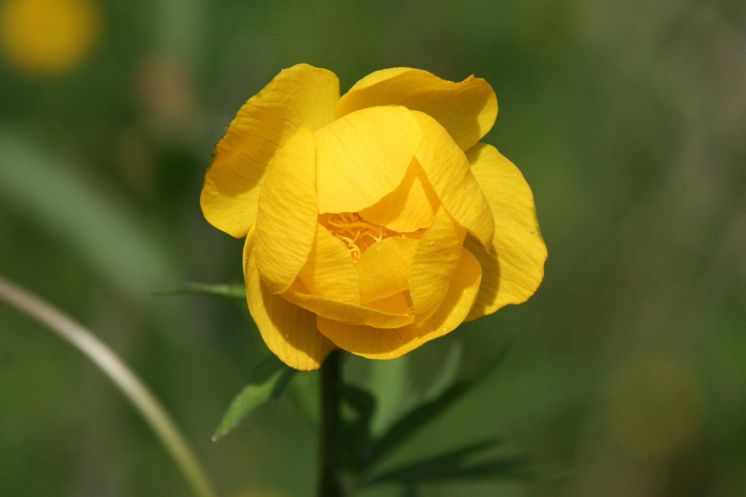 Trollblume (Trollius europaeus), fotografiert in Schwäbisch Hall-Wackershofen